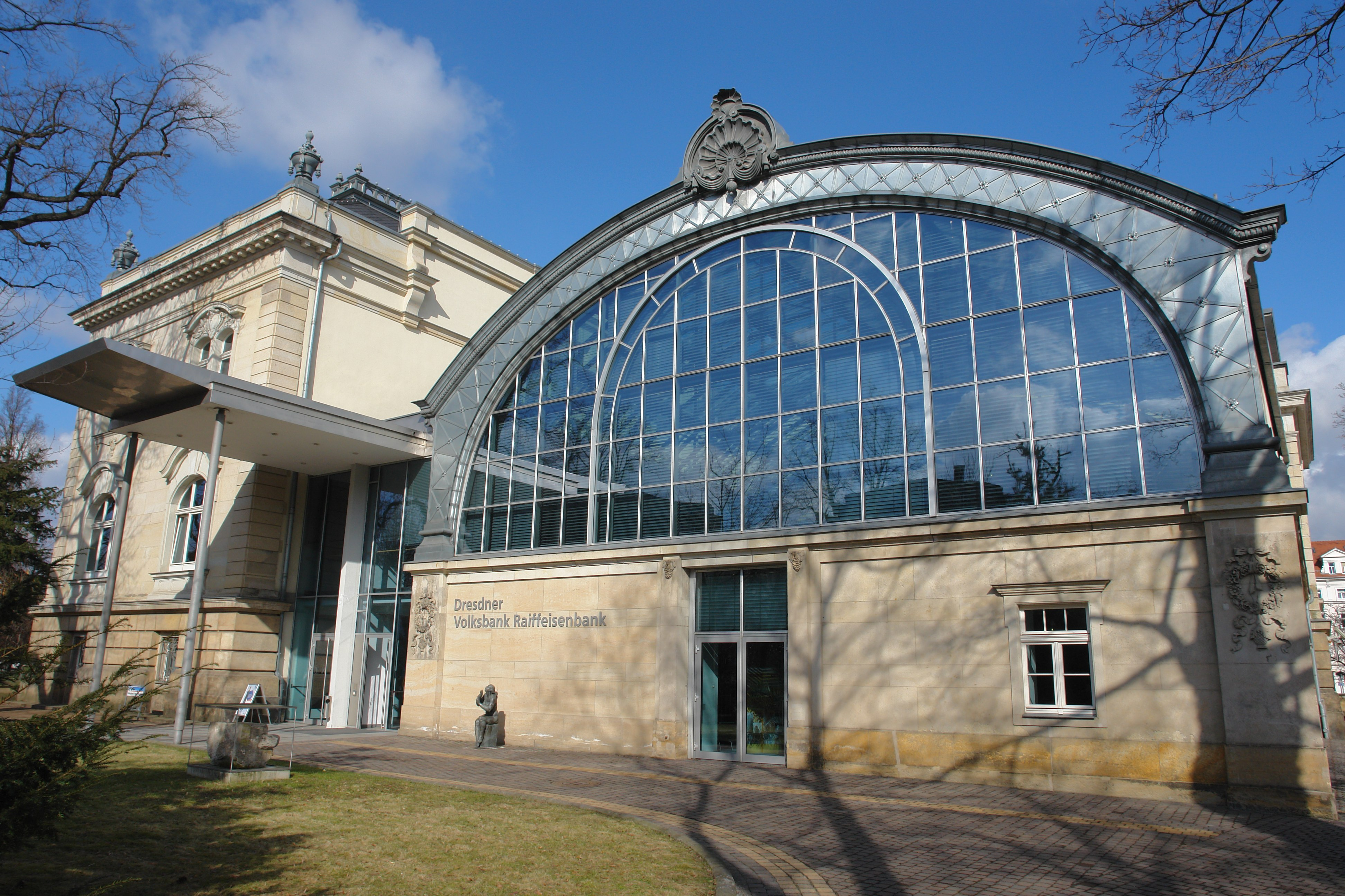 Wintergarten der Villa Eschenbach am Albertplatz, Dresden